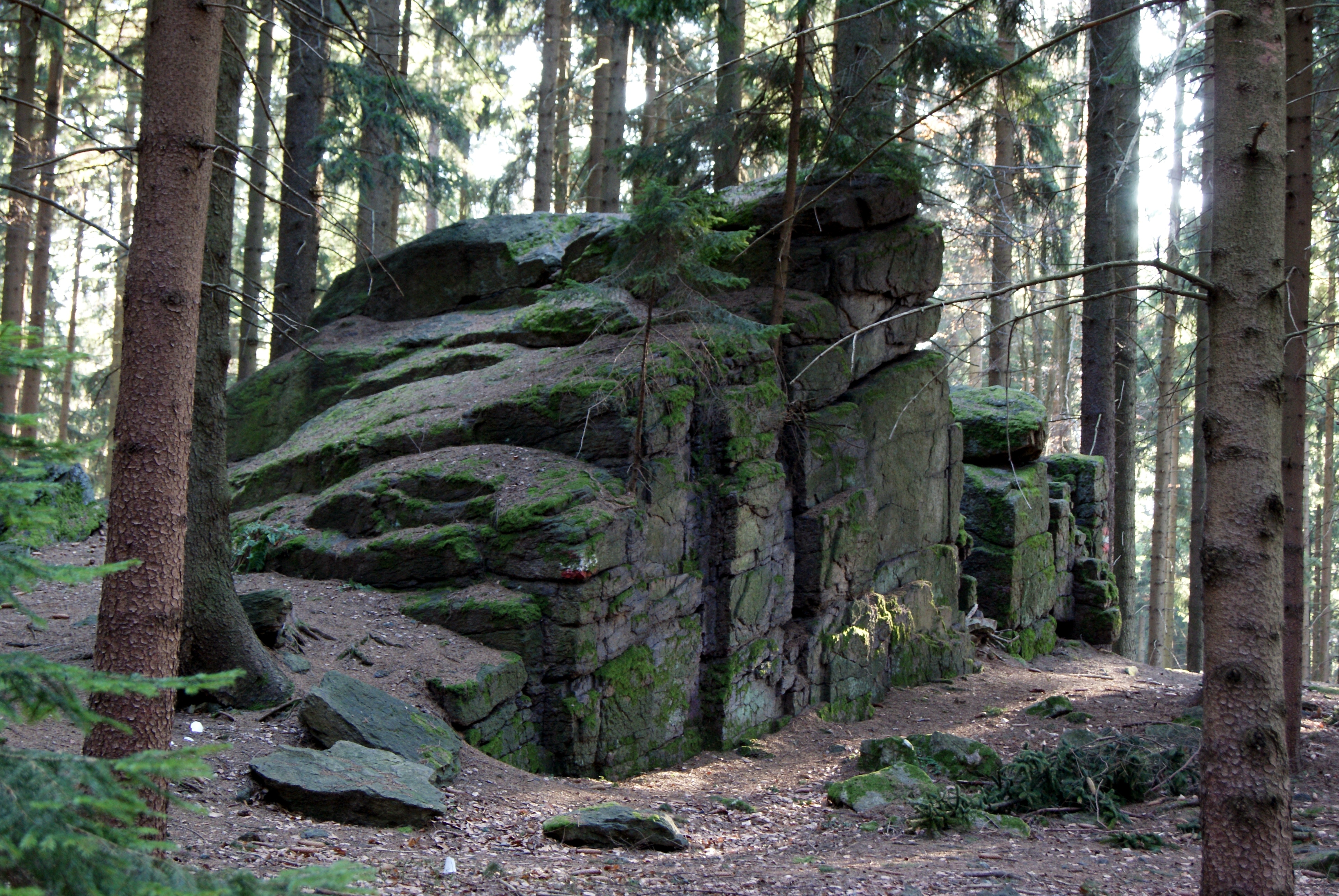 Predigtstuhl (Wieningerberg) im Waldviertel.